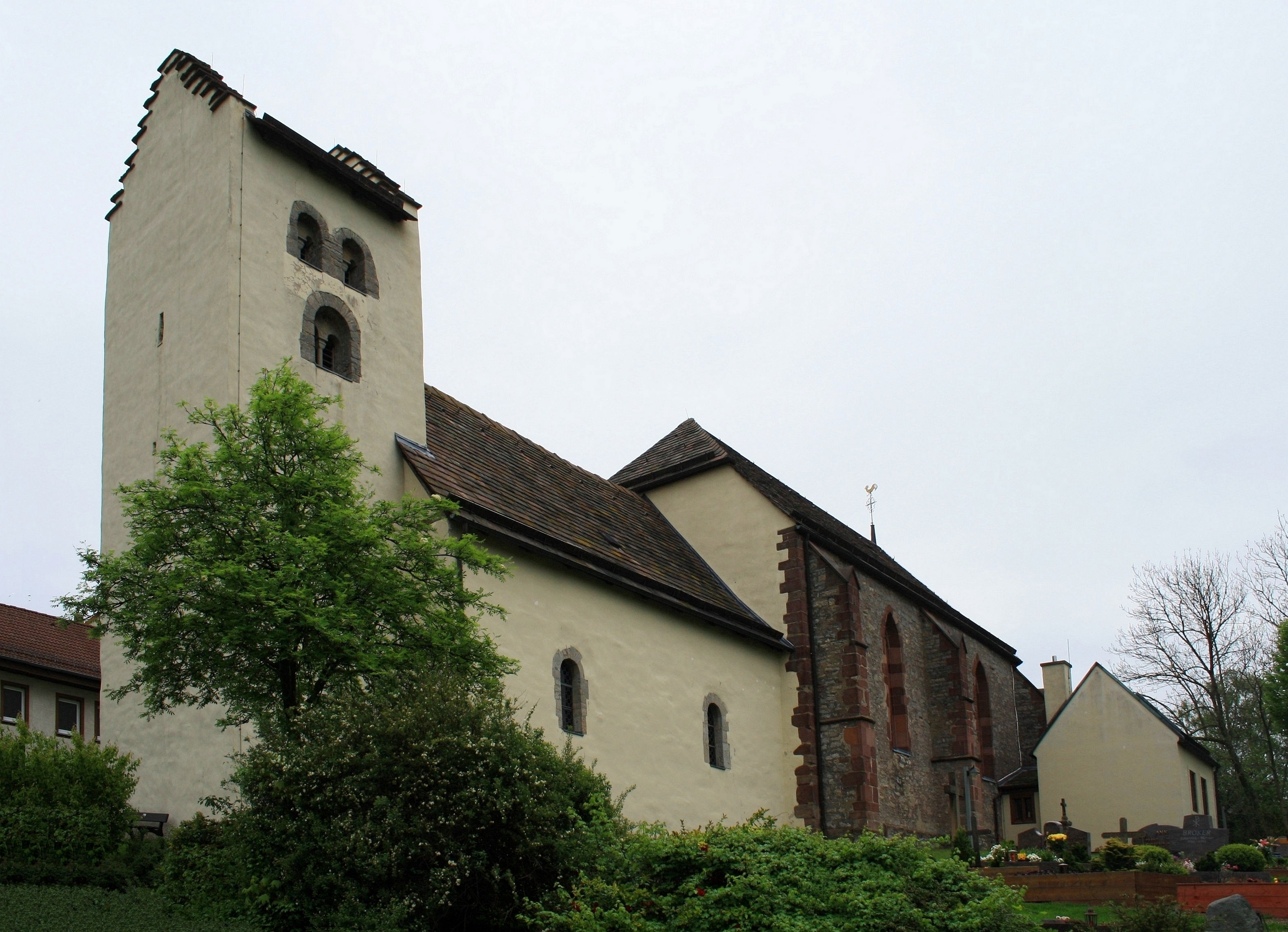 Jakobsberg, kath. Pfarrkirche St. Jakobus